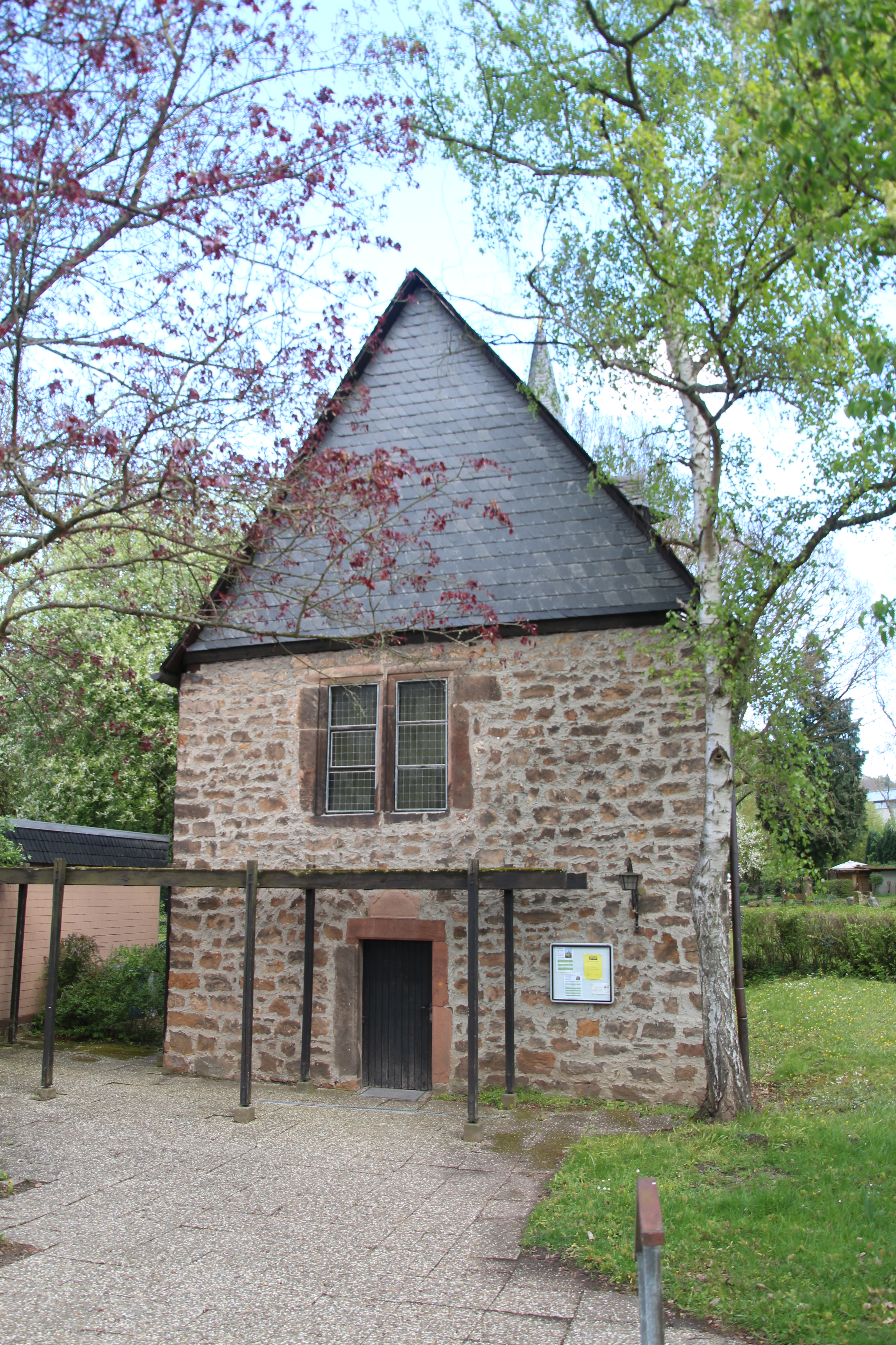 Siehe Bild und Dateiname